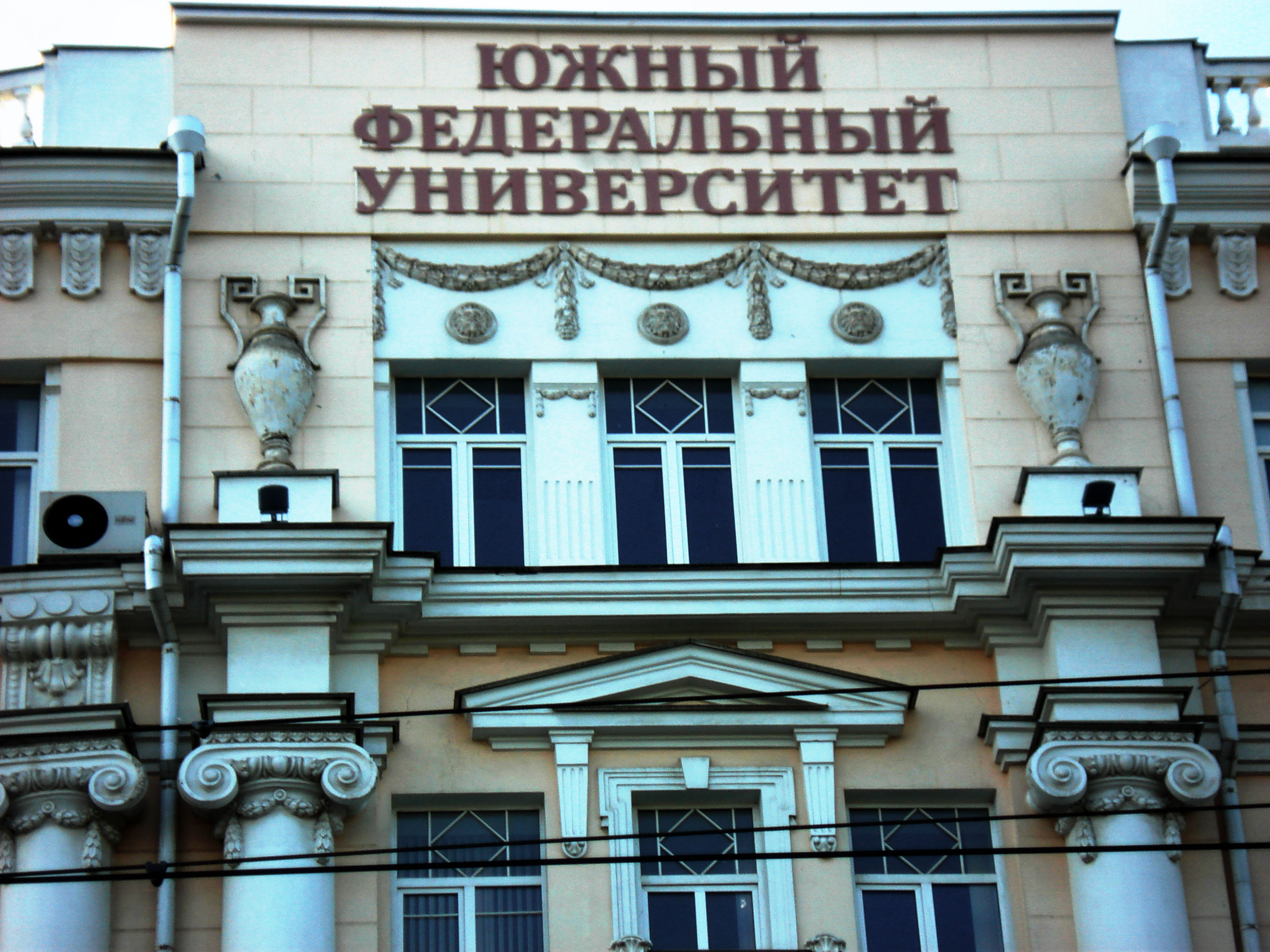 Дом купца Кистова: улица Большая Садовая, 105, Ростов-на-Дону, Ростовская область